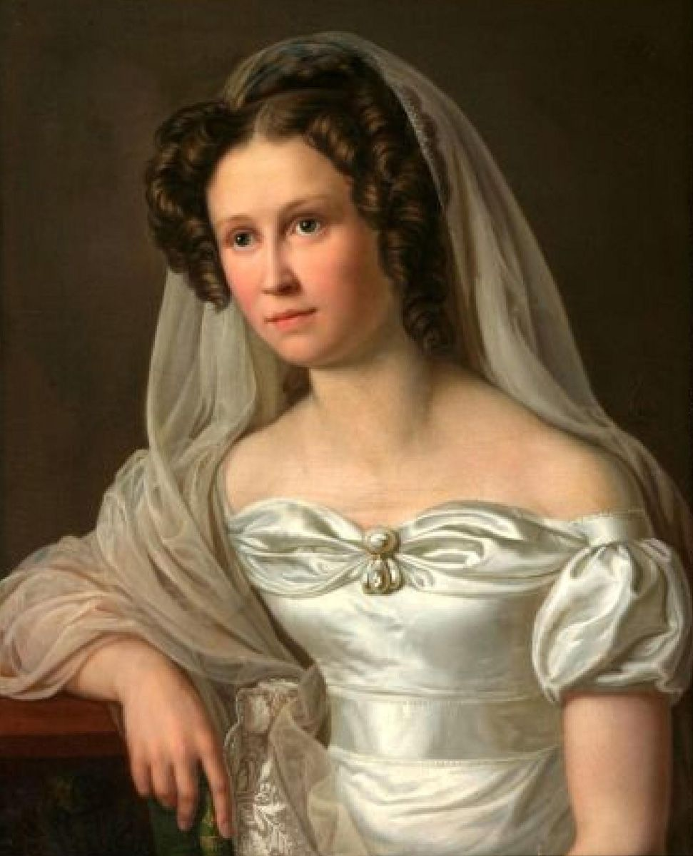 Rosalie Wagner, verh. Marbach, älteste Schwester Richard Wagners, im Alter von 23 Jahren Ölgemälde von Gustav Kühne